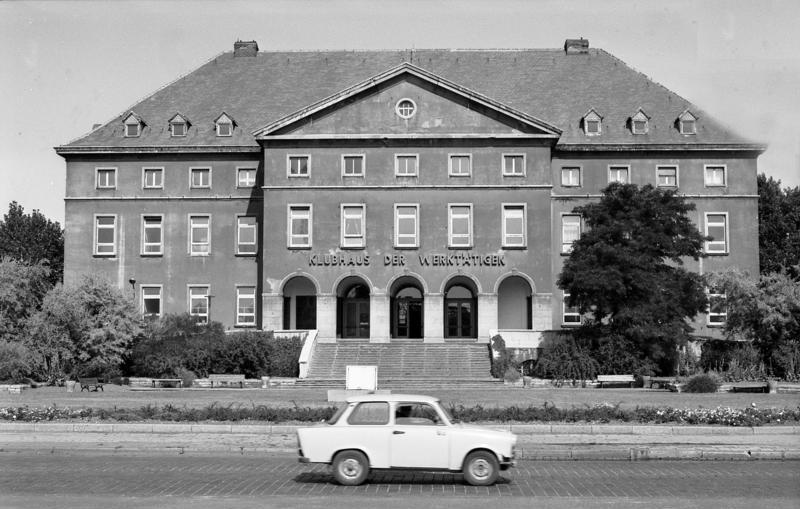 11.-18.8.1991 Bundesland Sachsen-Anhalt Leuna, Clubhaus der Werktätigen